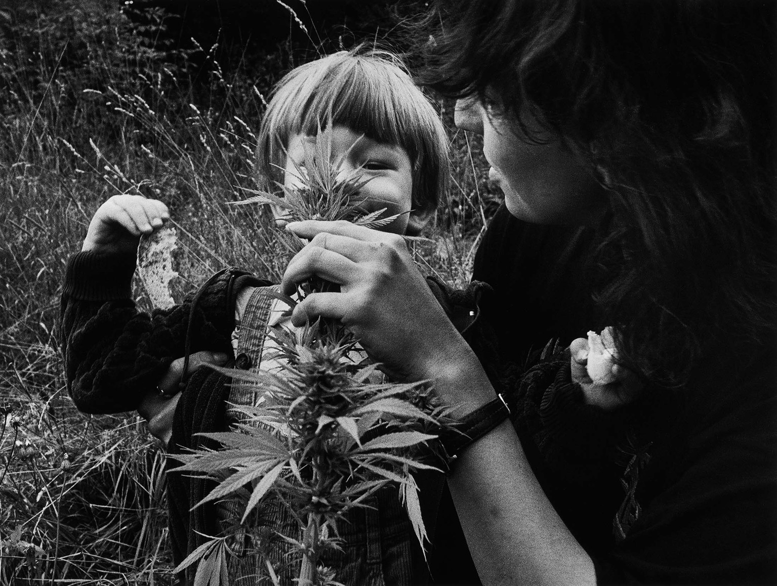 Jindřich Štreit´s archive